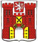 Znak města Havlíčkův Brod